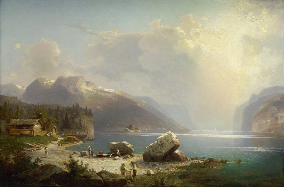 Am Hardanger Fjord in Norwegen.title QS:P1476,de:"Am Hardanger Fjord in Norwegen." label QS:Lde,"Am Hardanger Fjord in Norwegen."